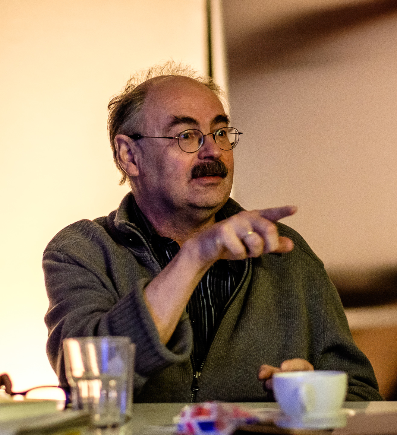 "After NSA-Gate" workshop Detlef Borchers (heise.de)